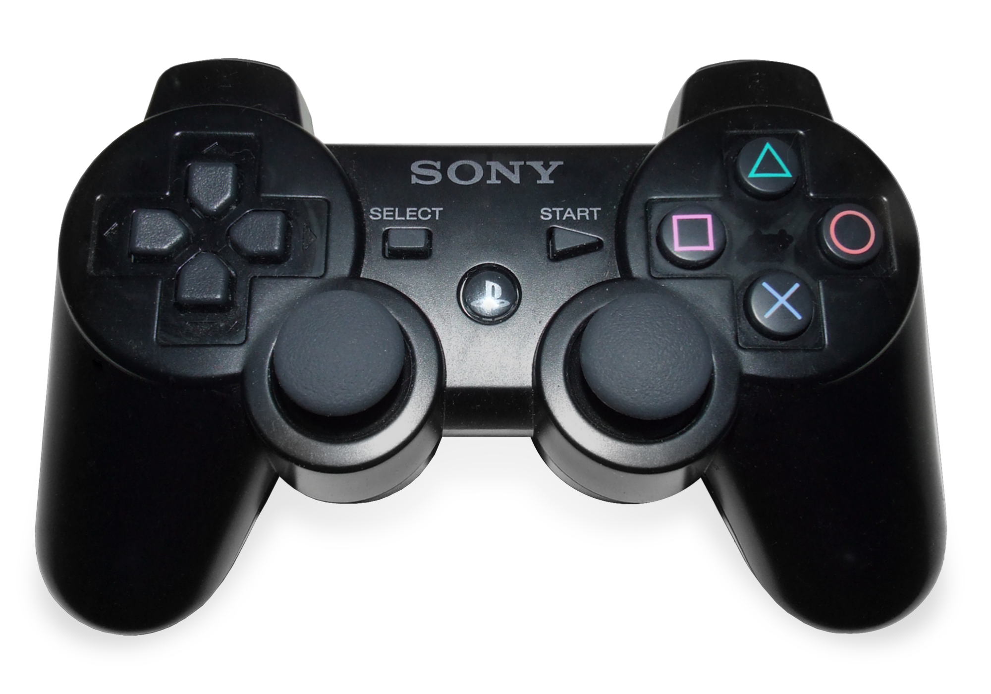 PS3 Controller set fra oven.